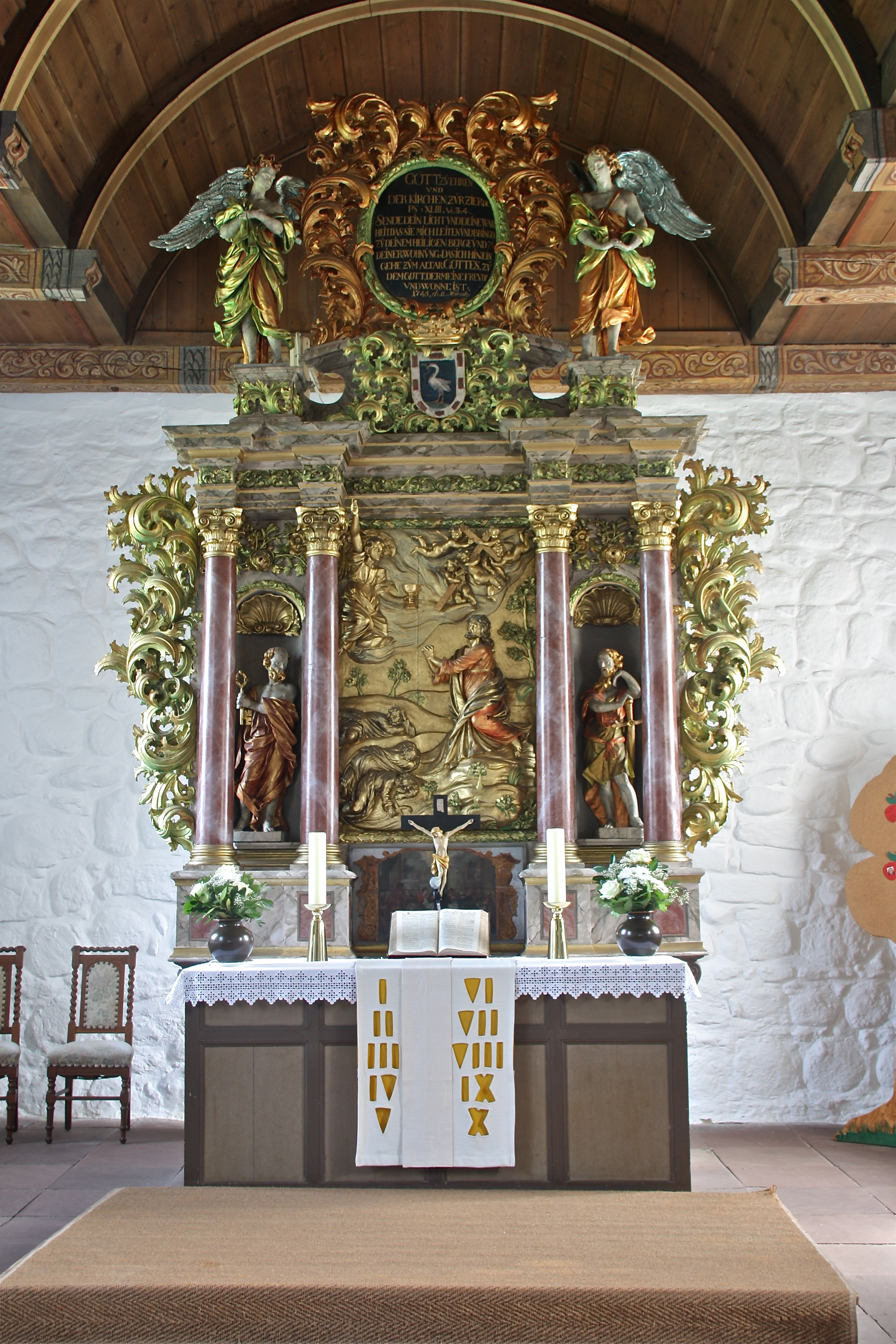 Dithmarschen, Tellingstedt, Kirche St. Martin, Altar